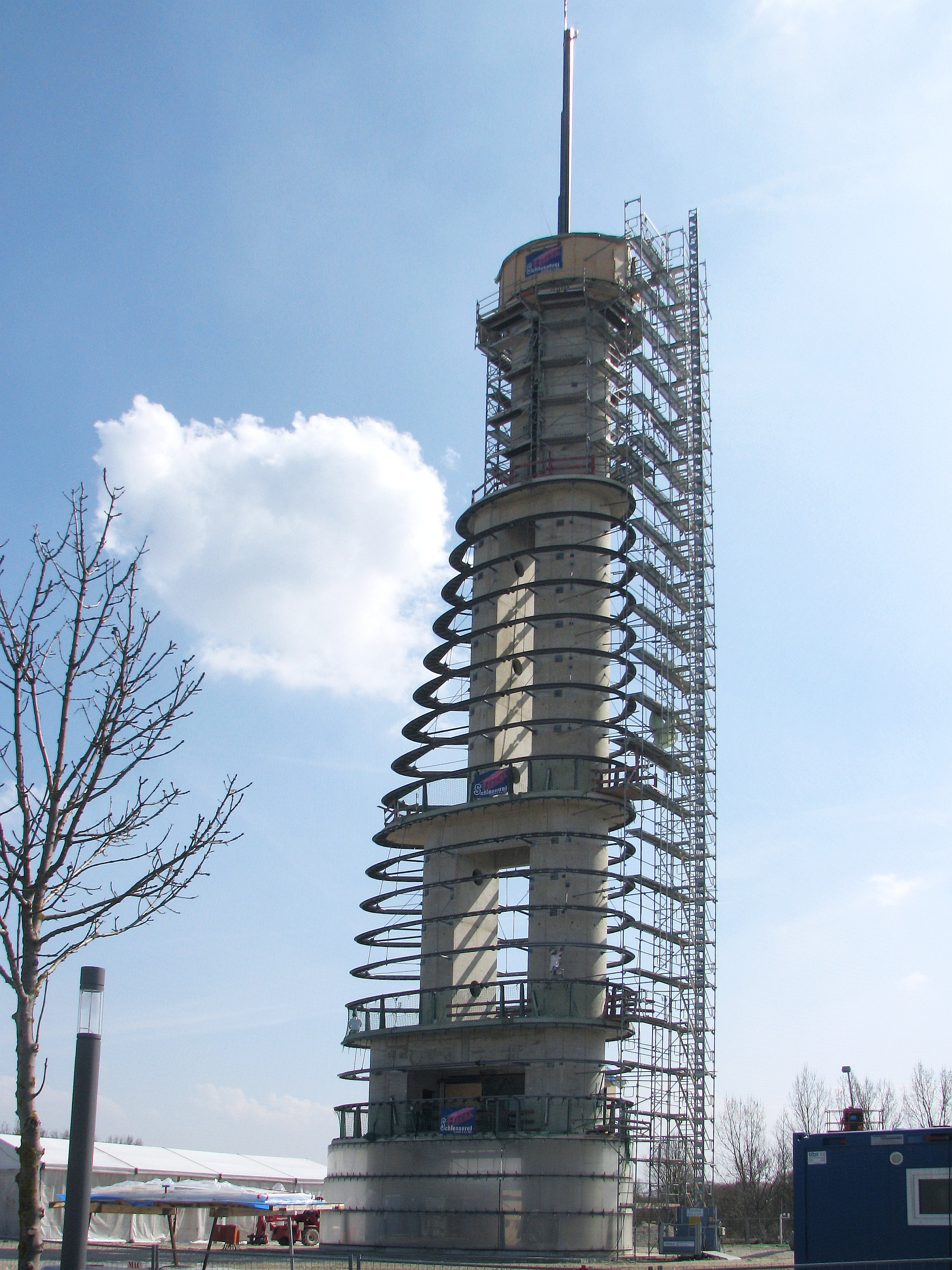 Der meteorologische Messturm der TUM Techn Universität München mit 62 m Höhe während der Bauzeit im Jahre 2009 (noch ohne die später angebrachte Plexiglasverkleidung, heute Oskar-von-Miller-Turm, Garching, Bayern. Foto 2009 Wolfgang Pehlemann IMG_1638